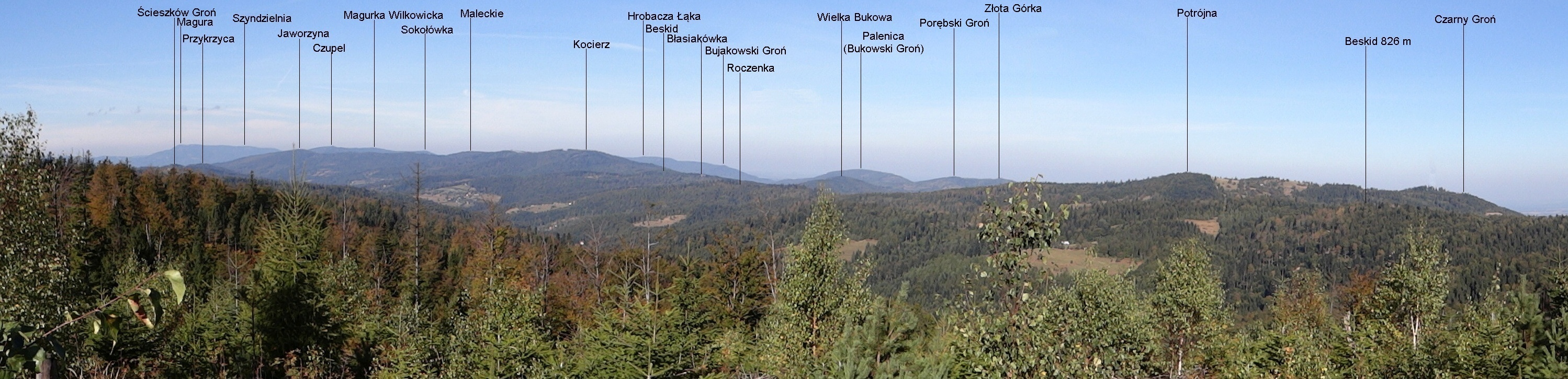 Panorama z okolic Wielkiego Gibasów Gronia